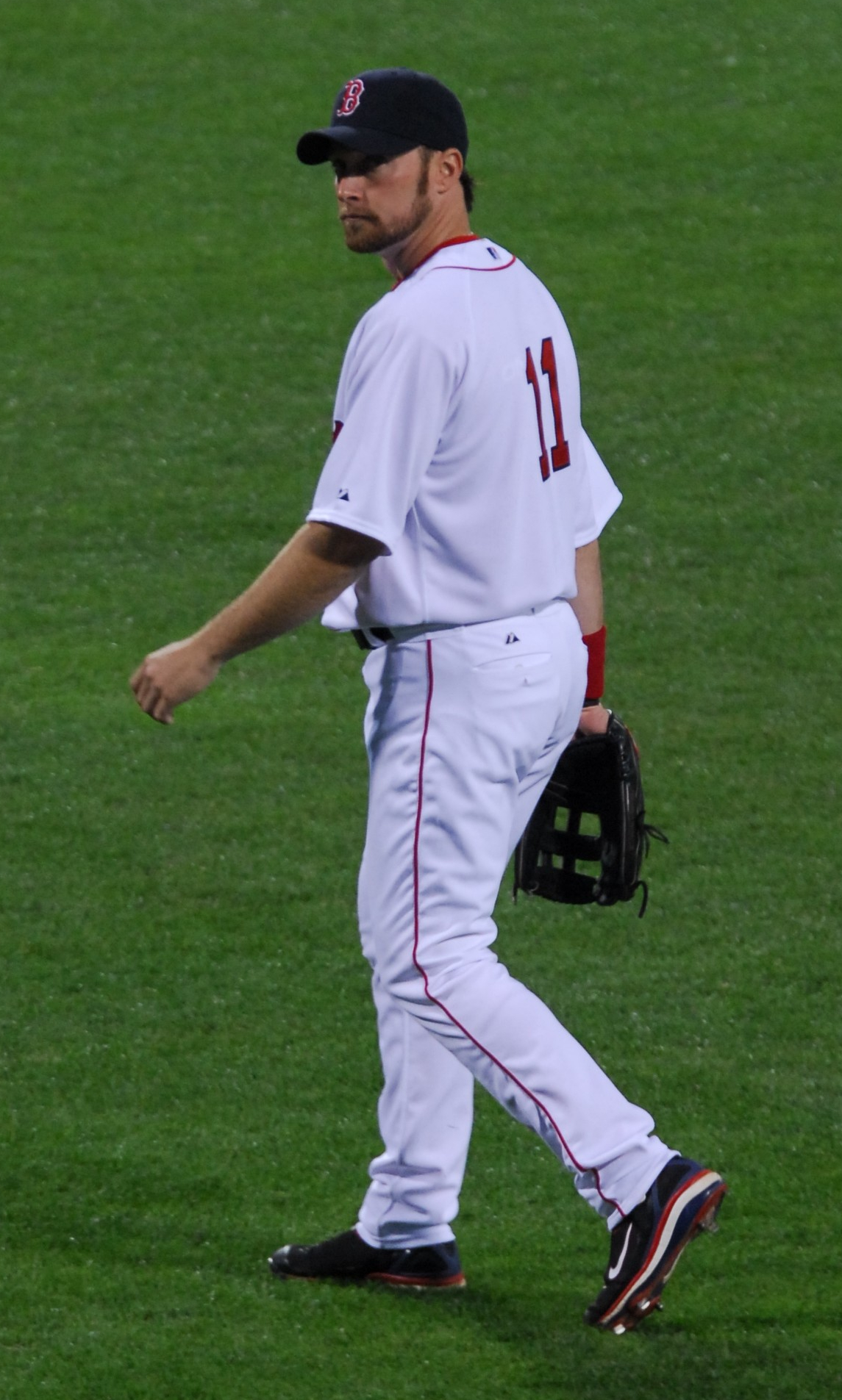 Mark Kotsay